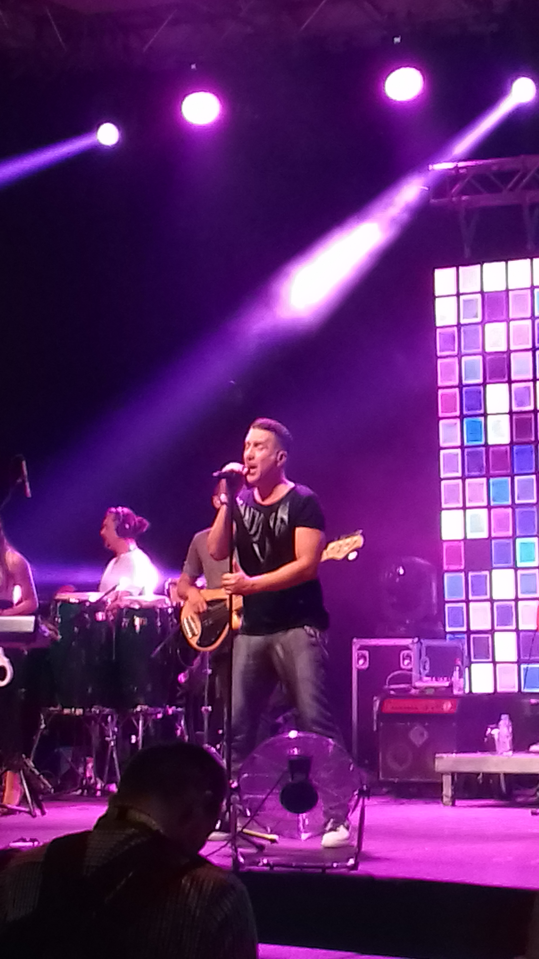 Nastup Željka Joksimovića na zatvaranju Zenica summer festa 2019